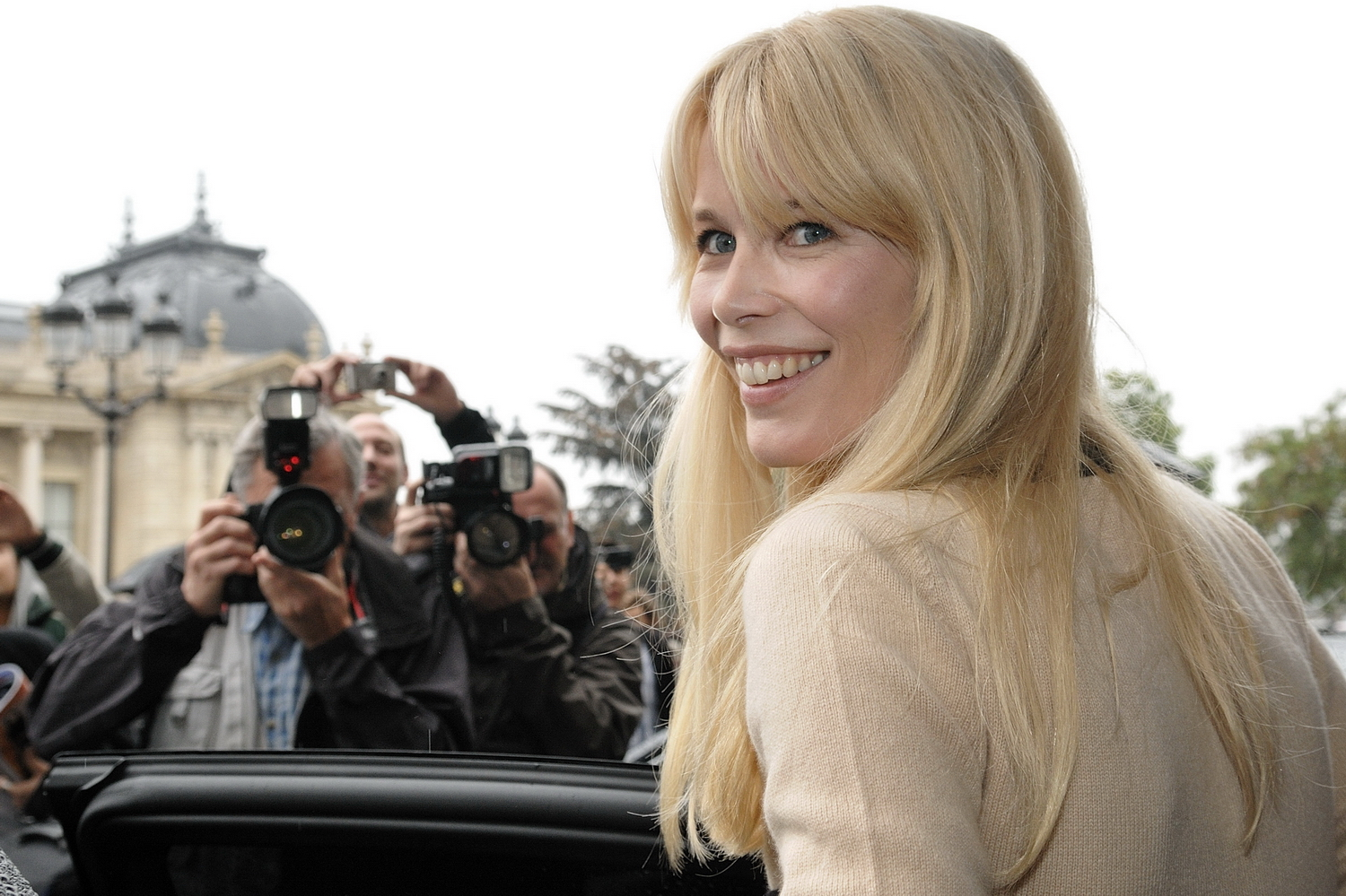 Défilé Chanel printemps/été 2010 prêt-à-porter au Grand Palais (Avenue du Général Eisenhower - Paris 75008)